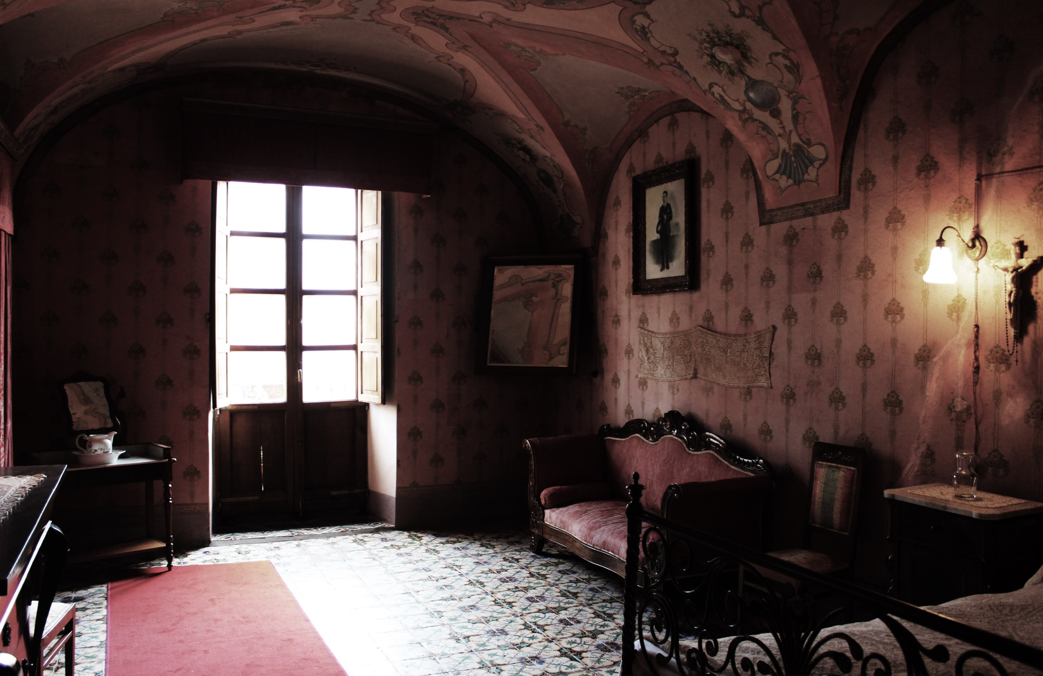 Museo Casa Deriu This is a photo of a monument which is part of cultural heritage of Italy.